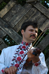 Олег Бут, Країна мрій-2006